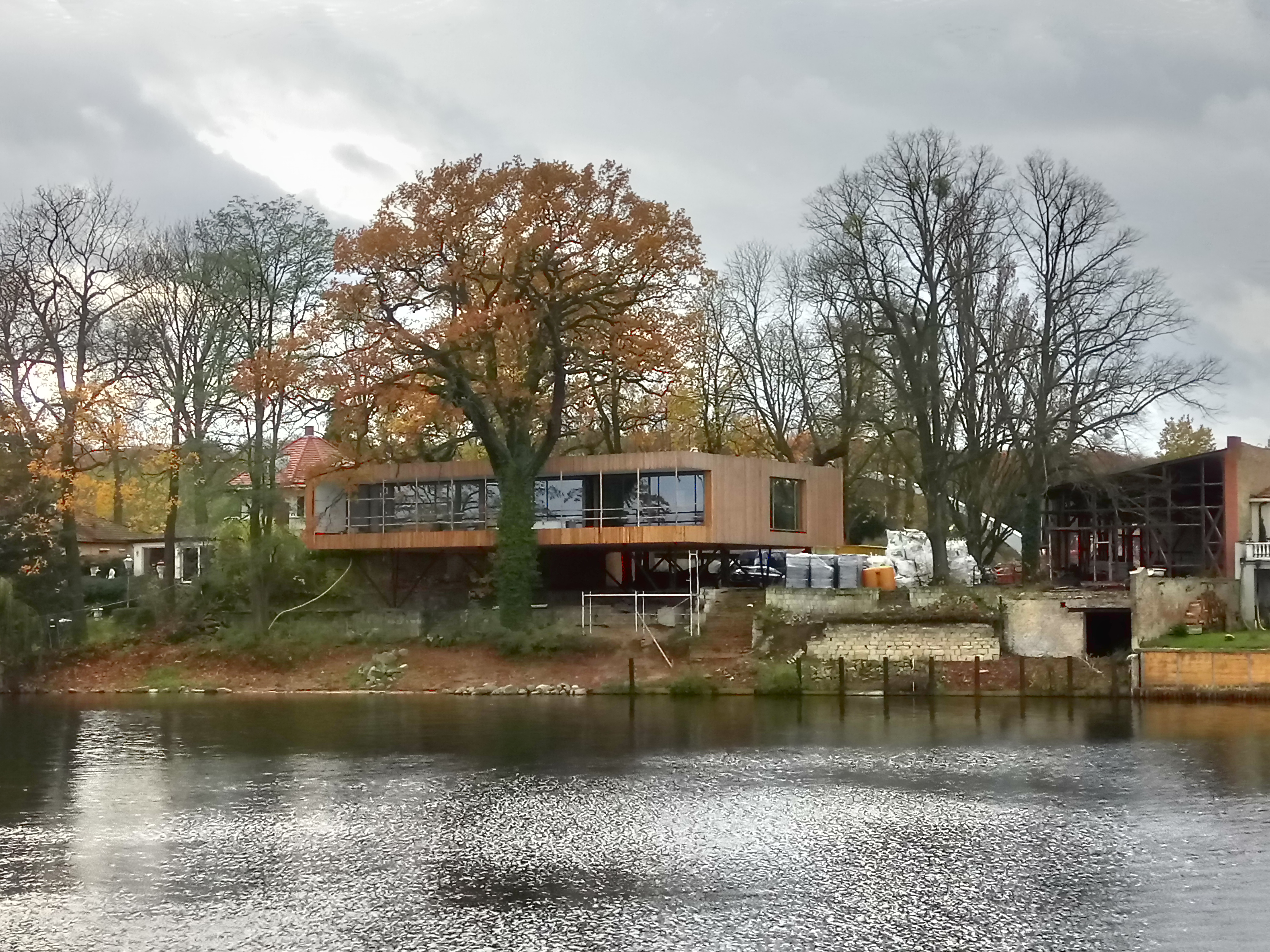 Gelände des ehemaligen Parkrestaurants in Nedlitz von Nordosten gesehen, von der alten Schifffahrtsverbindung zum Lehnitzsee und zur Nordbrücke.